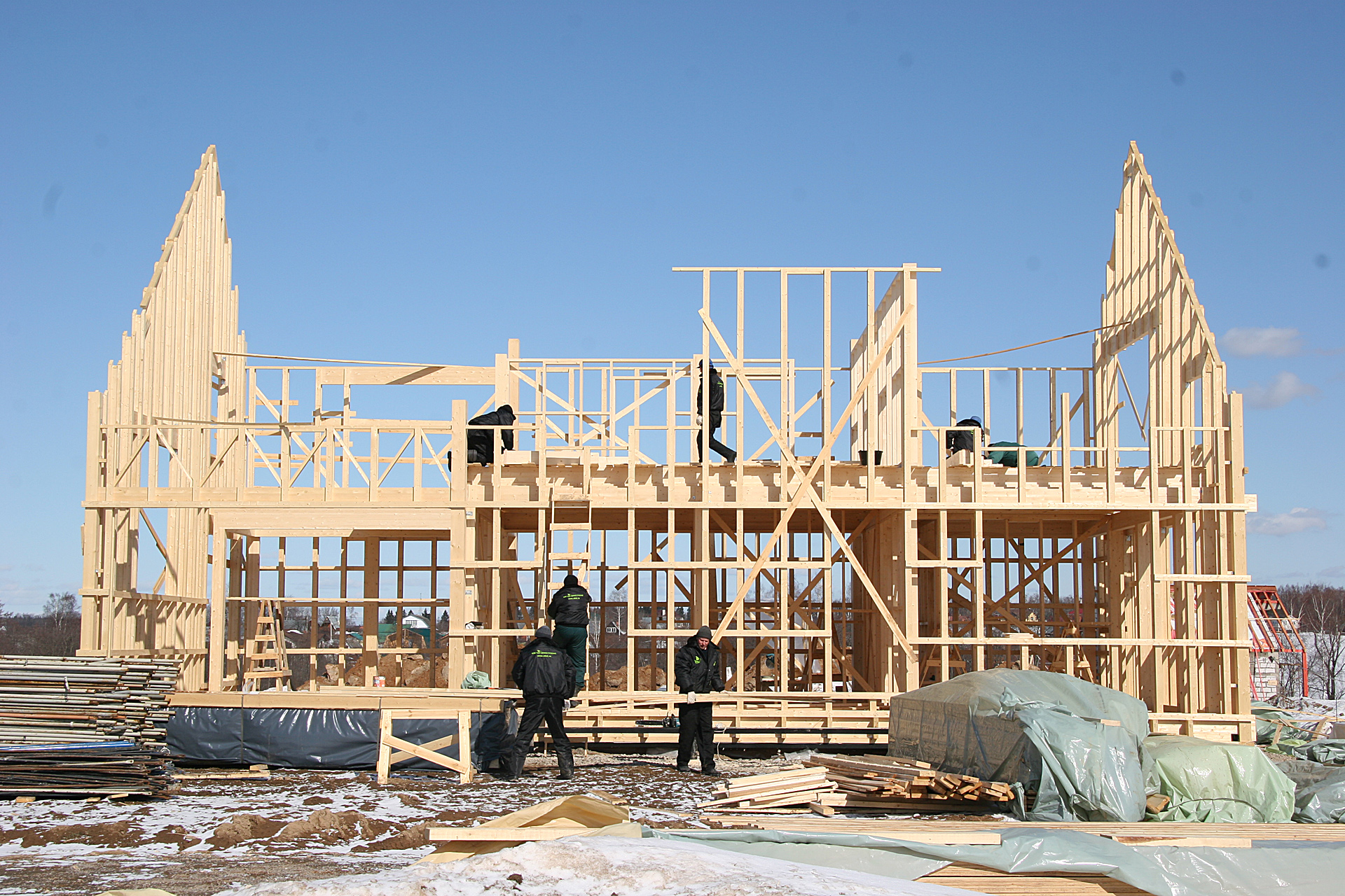 Каркас-фахверк из клееного бруса, процесс возведения первого в России "зеленого" дома, Активный дом. НЛК Домостроение, Россия